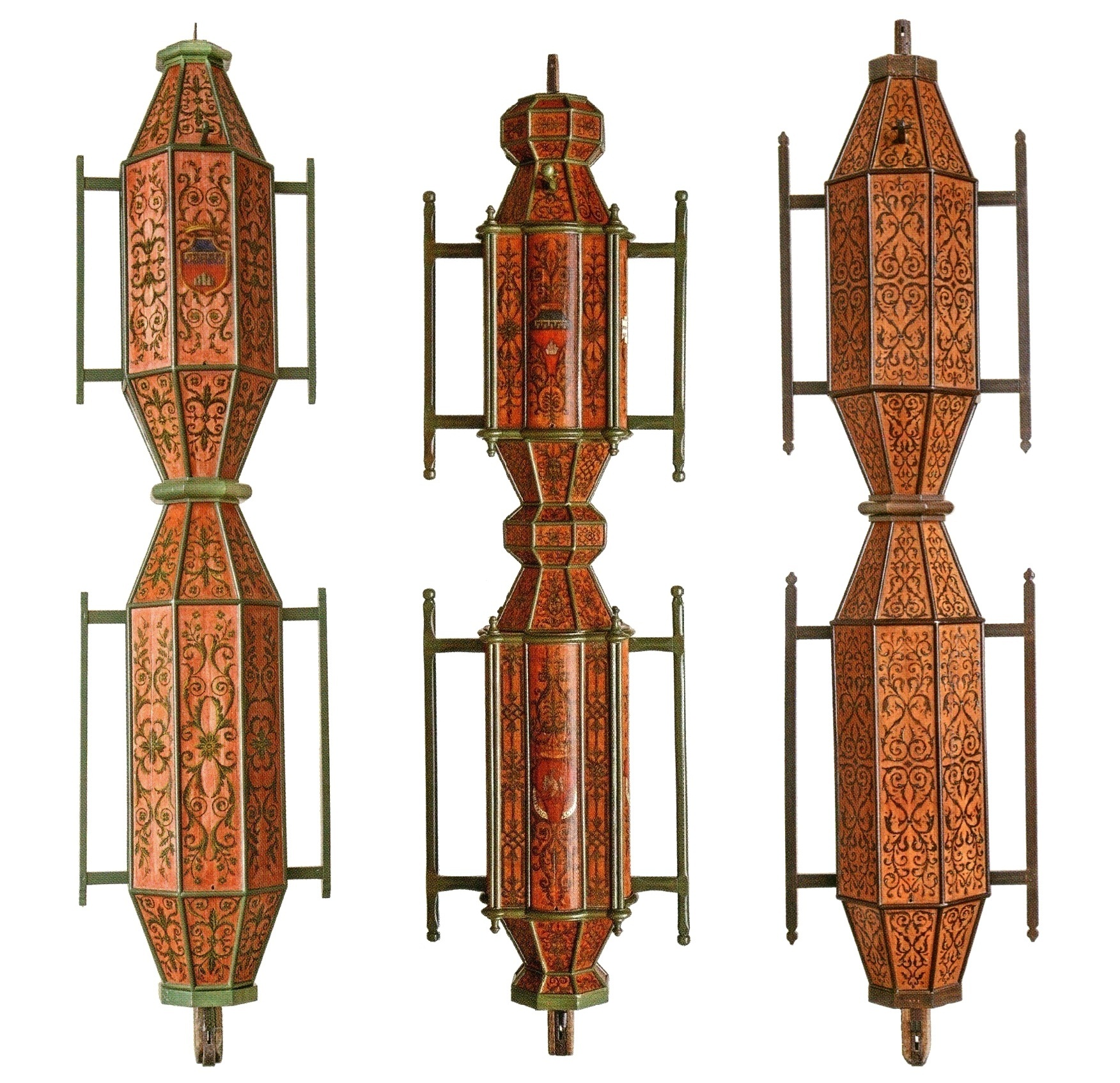 prospetto ceri